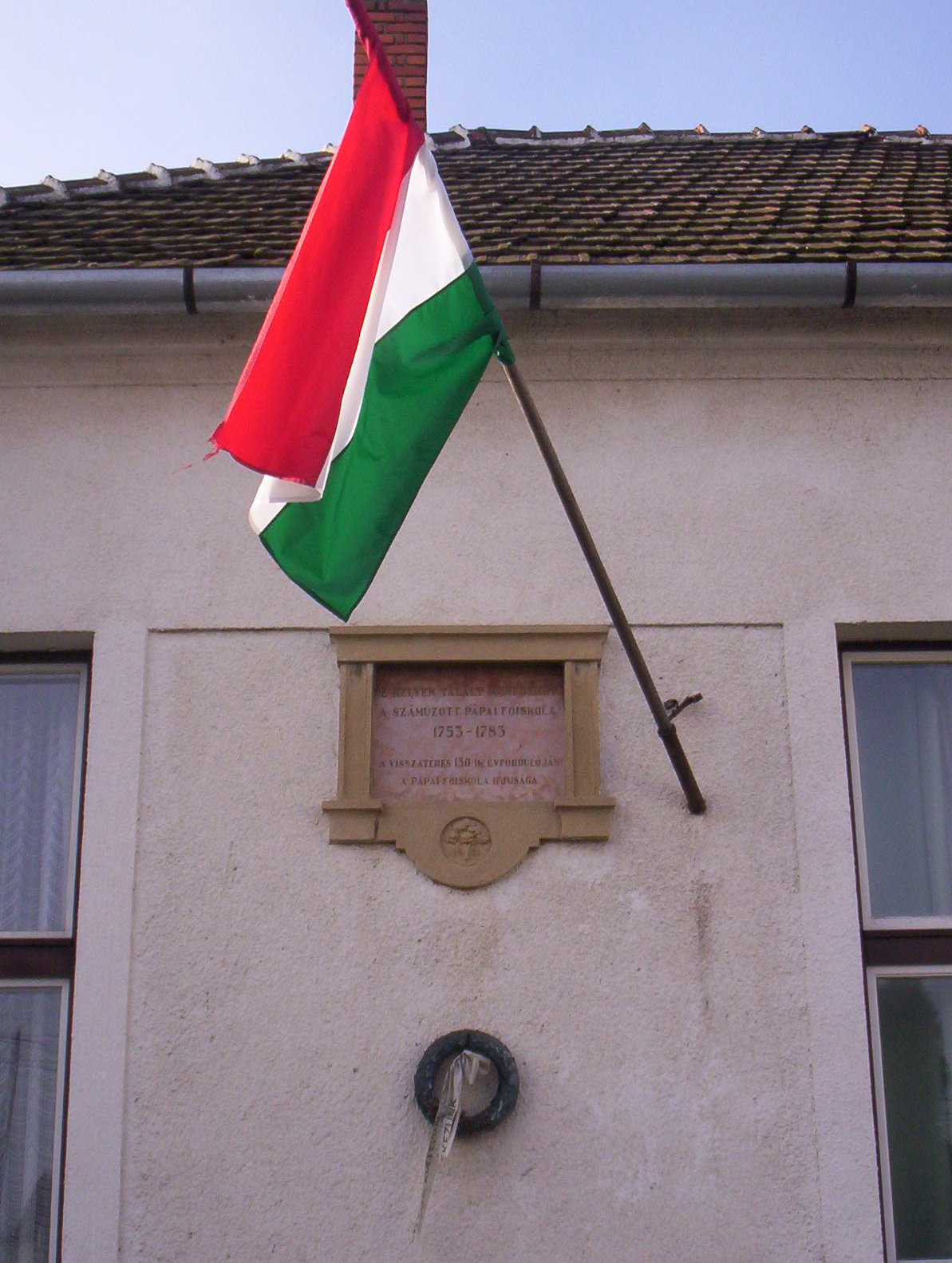 Tablet on the wall of the school in Adásztevel to the memory of the 30 years of exile, inaugurated by the Pápa Reformed College in 1933, the 150th anniversary of the return. Tábla az adászteveli iskola falán a Pápai Református Kollégium 30 száműzetésben töltött évének emlékére. 1933-ban, a visszatérés 150. évfordulóján avatták fel.